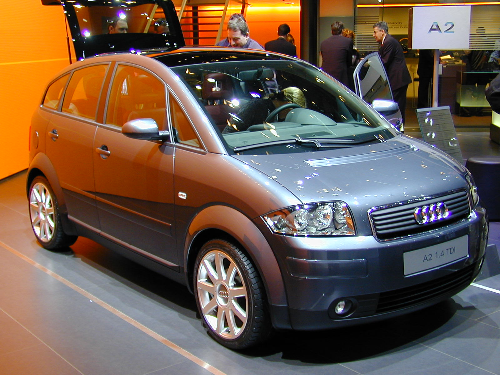 Salon de Genève 2004 SAG2004 085 Audi A2